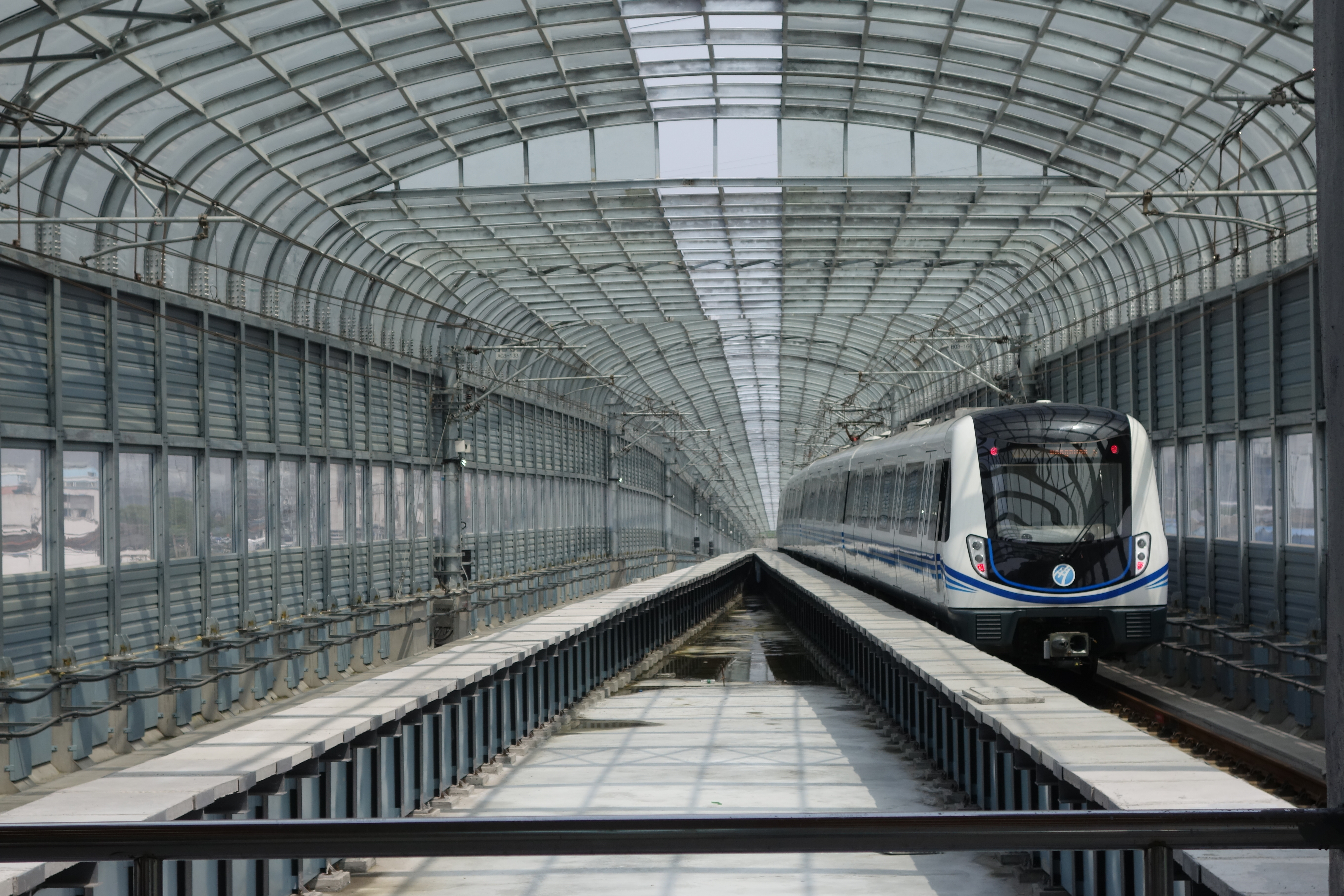 列车离开徐家漕长乐站